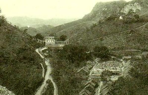 Zhennan_Pass_citadel